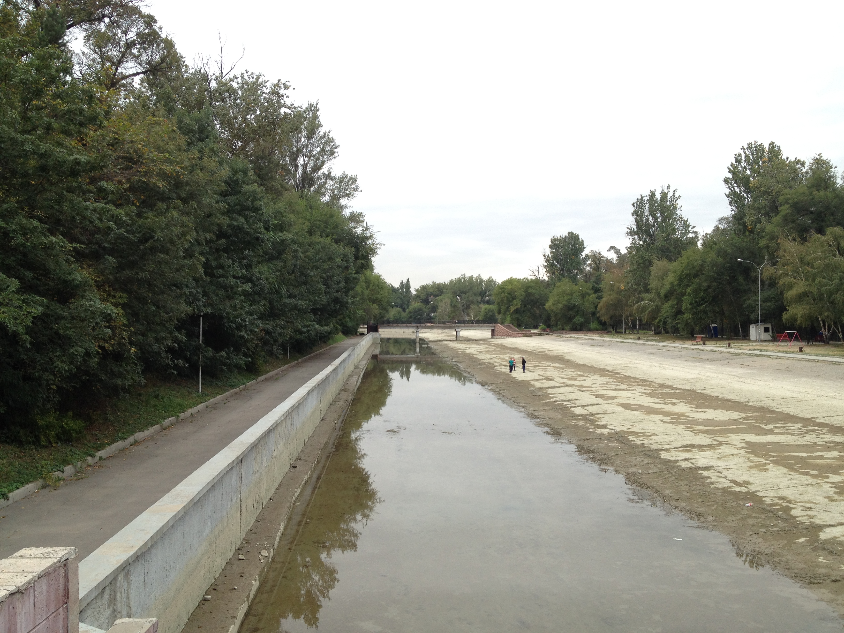 Большой Алматинский канал на территории рощи Баума